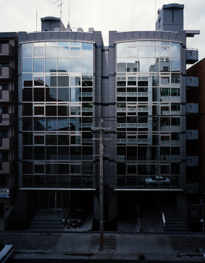 大建設計大阪事務所（大阪市西区京堀町）